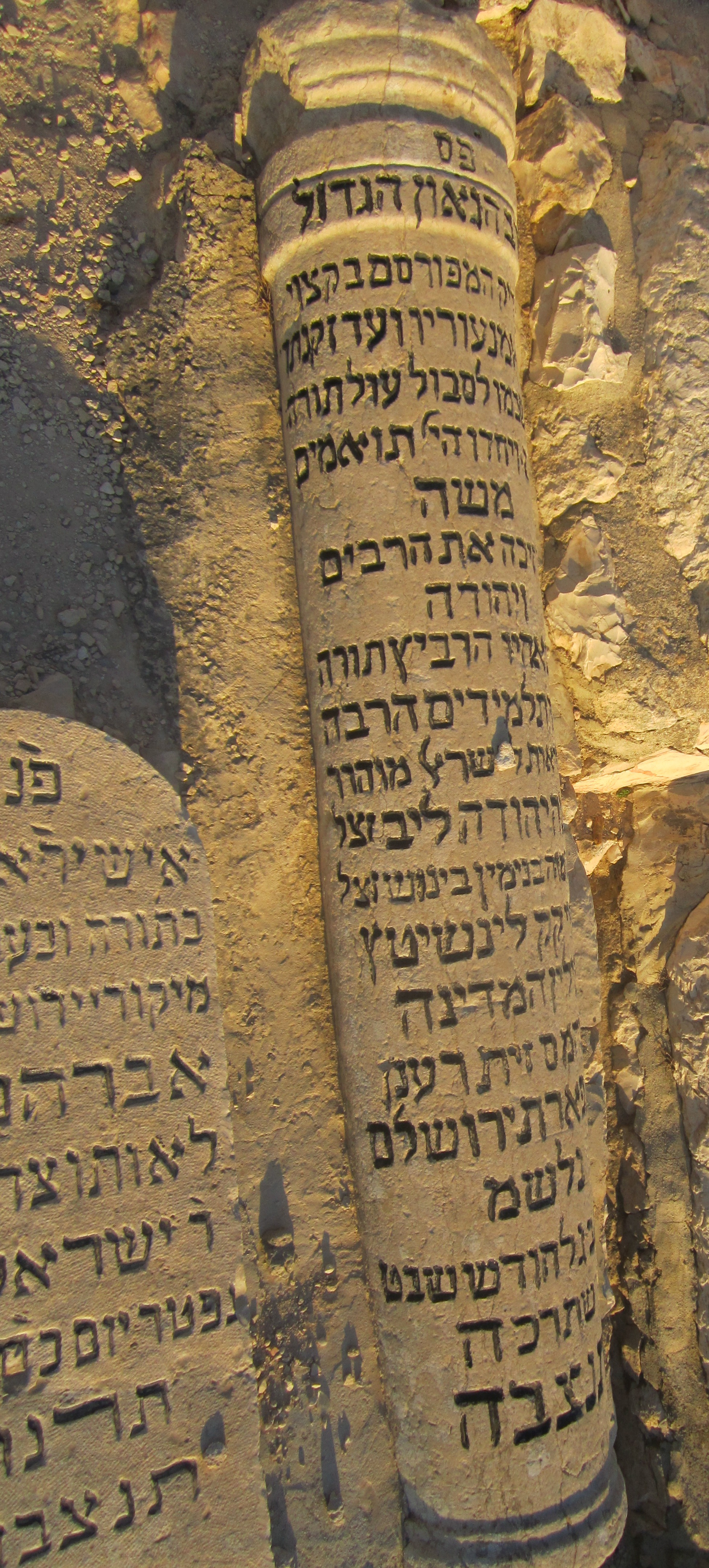 קבר הרב משה יהודה לייב זילברברג מקוטנא, בעל זית רענן, בהר הזיתים